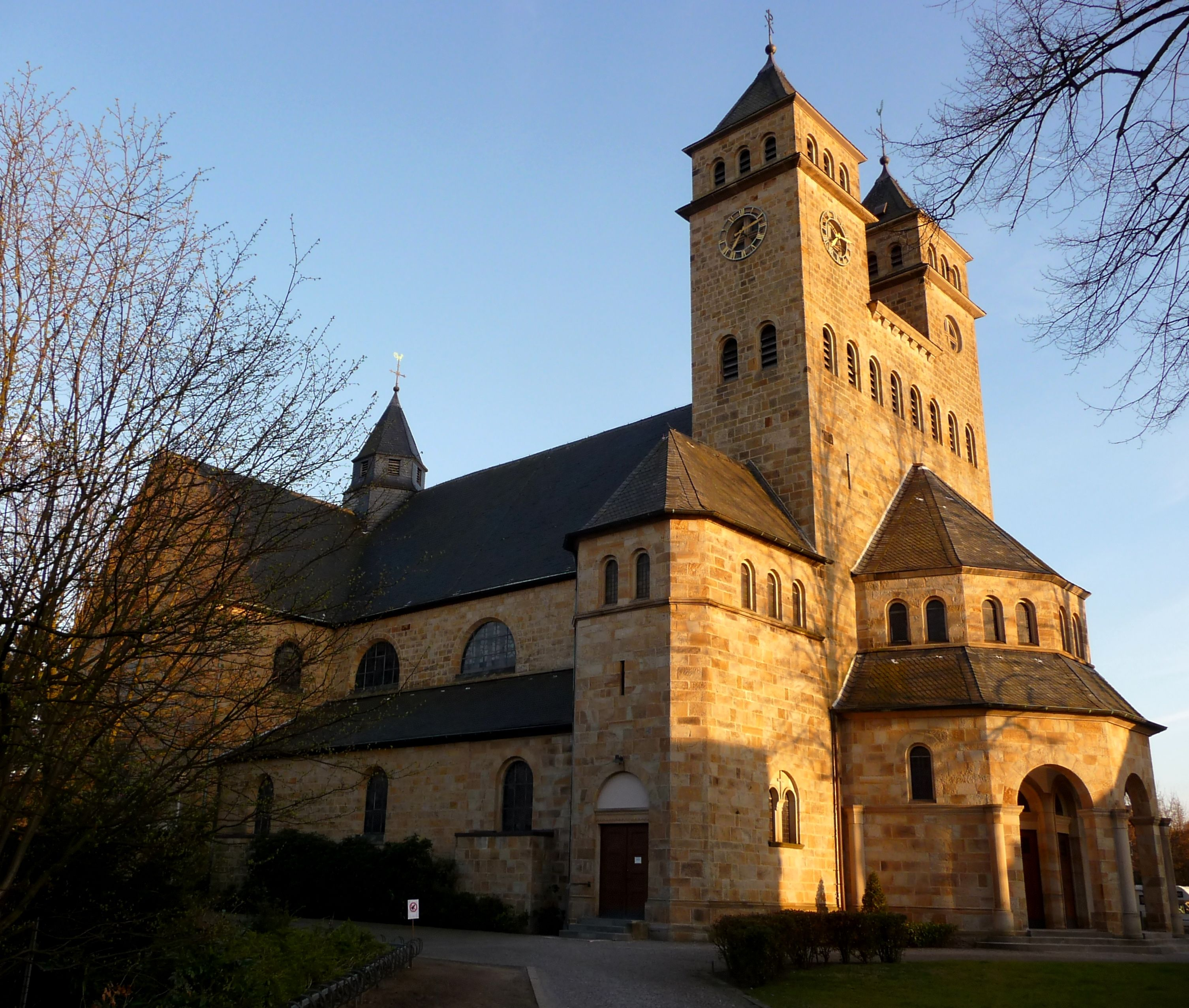 Herz-Jesu Kirche (kath.) in 48282 Emsdetten